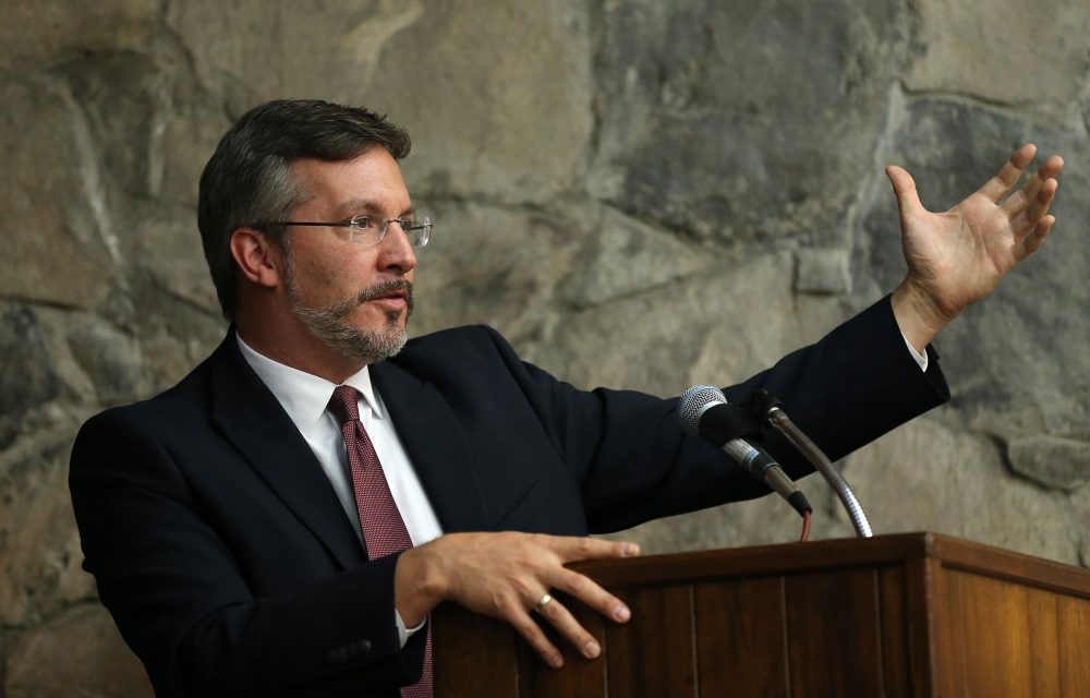 John Ackerman